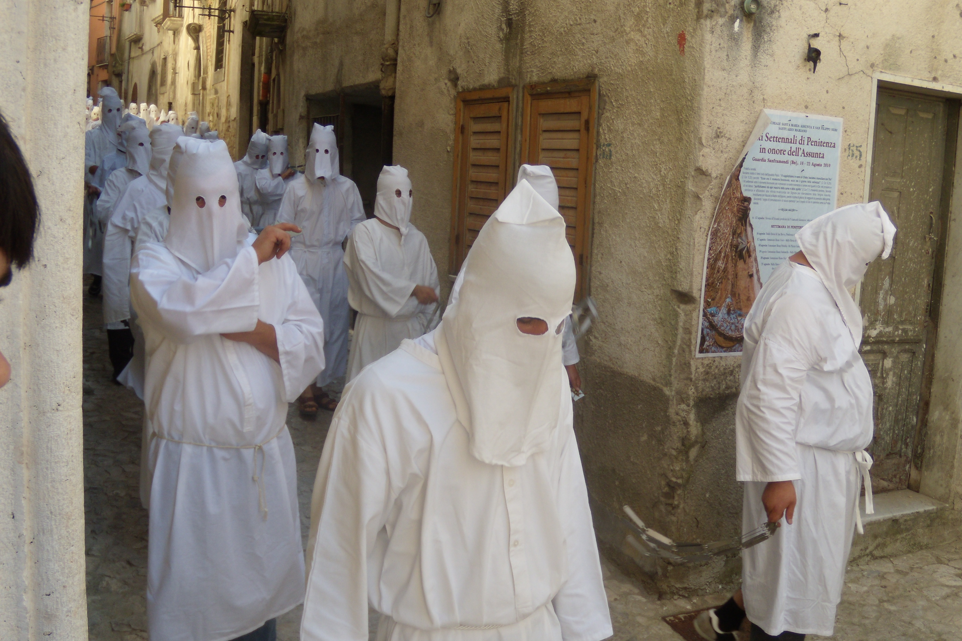 Gruppo di flagellanti durante l'edizione 2010 dei riti settennali di penitenza in onore dell'Assunta a Guardia Sanframondi (Italia).